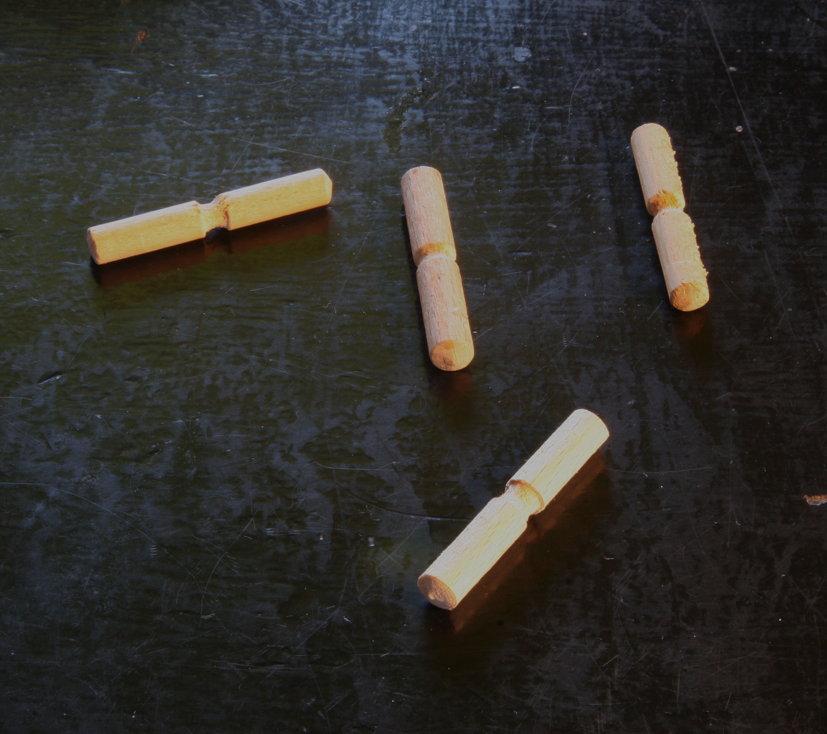 Bærepinde, omtrent 4,8 cm lange